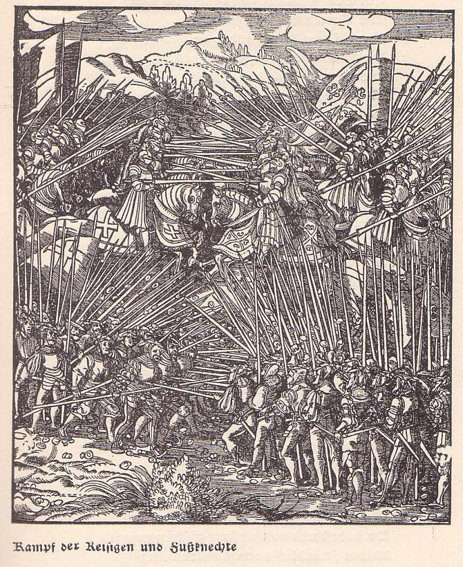 Woodcut/Holzschnitt von H. Burgmair